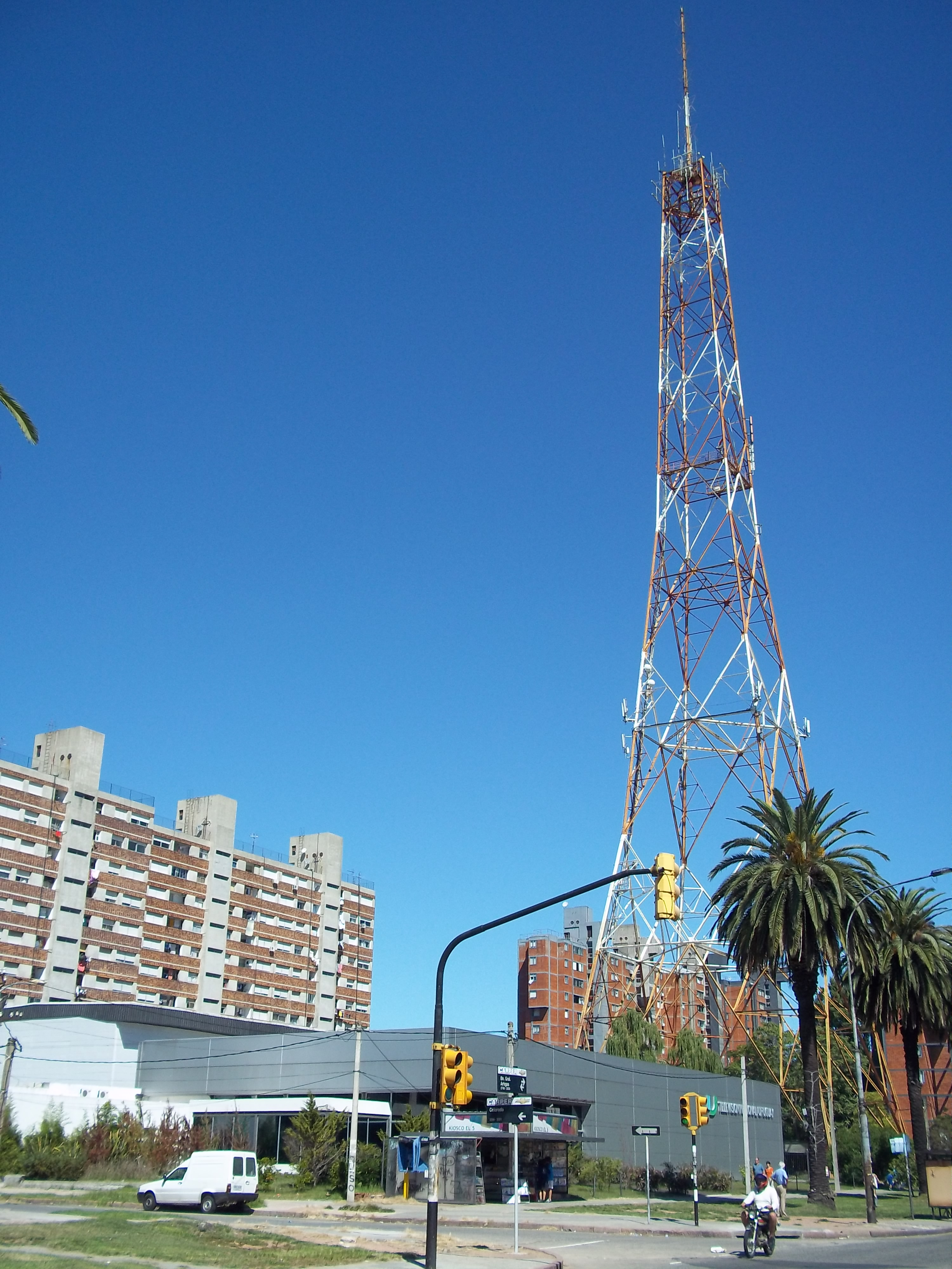 Instalaciones y antena de transmisión del Canal 5, Televisión Nacional de Uruguay.